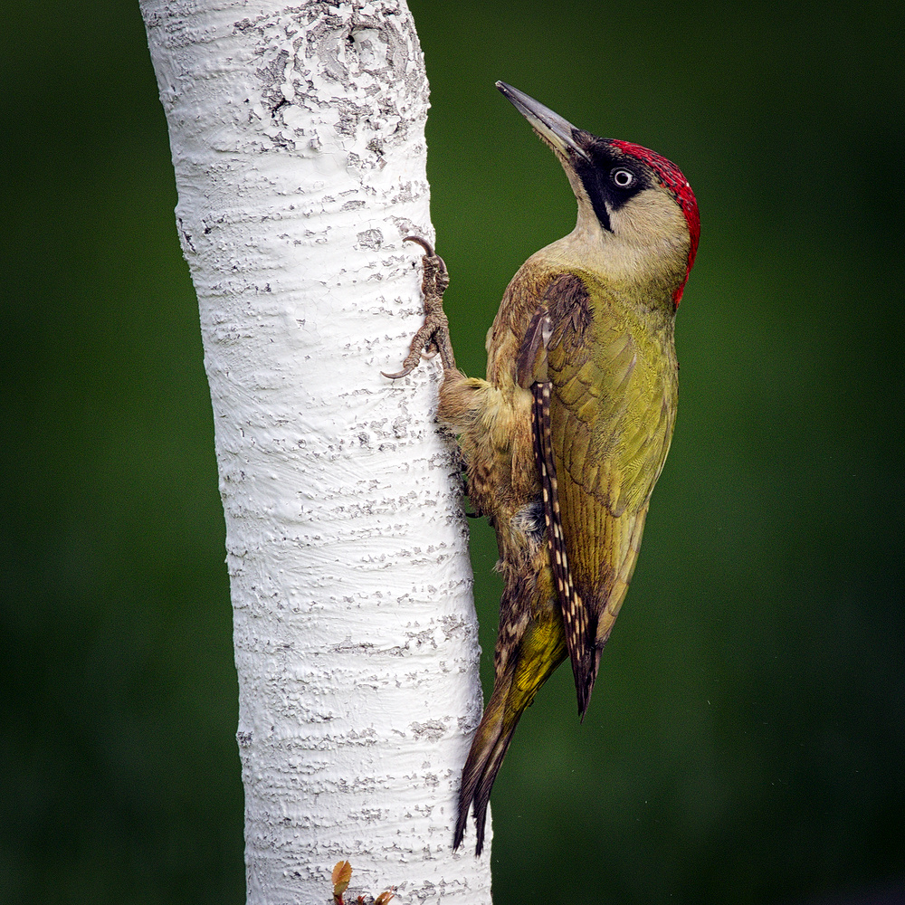 Female green woodpecker (Picus viridis) on a trunk of a garden tree. Samica dzięcioła zielonego (Picus viridis) na pniu drzewa owocowego.